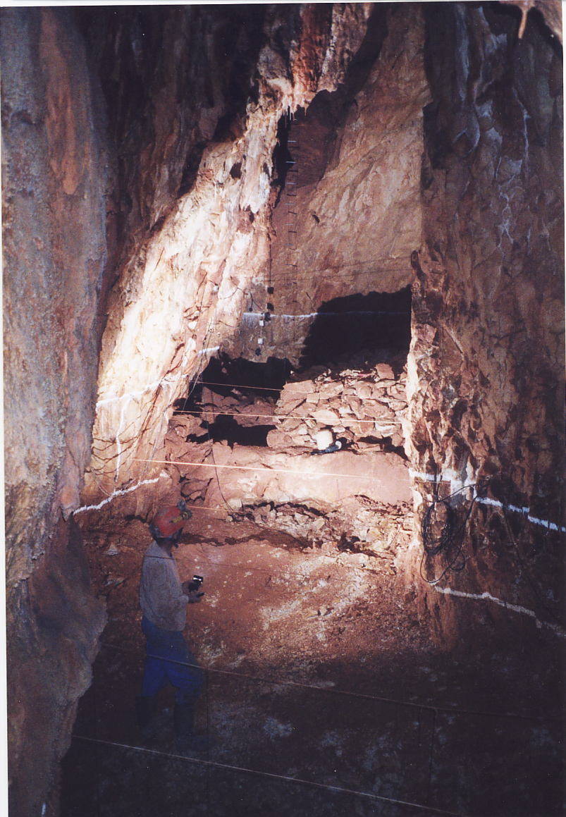 Grotte préhistorique de Sireyjol